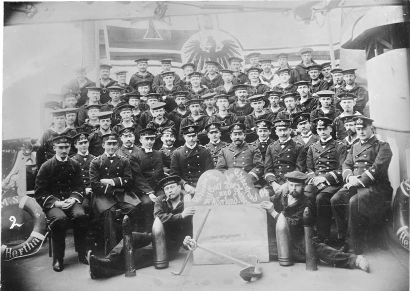 China Aufschrift des Schildes: Wir dienten treu am Chinastrand mit Gott für Kaiser und Vaterland. 1901-1904 S.M.S. Hertha